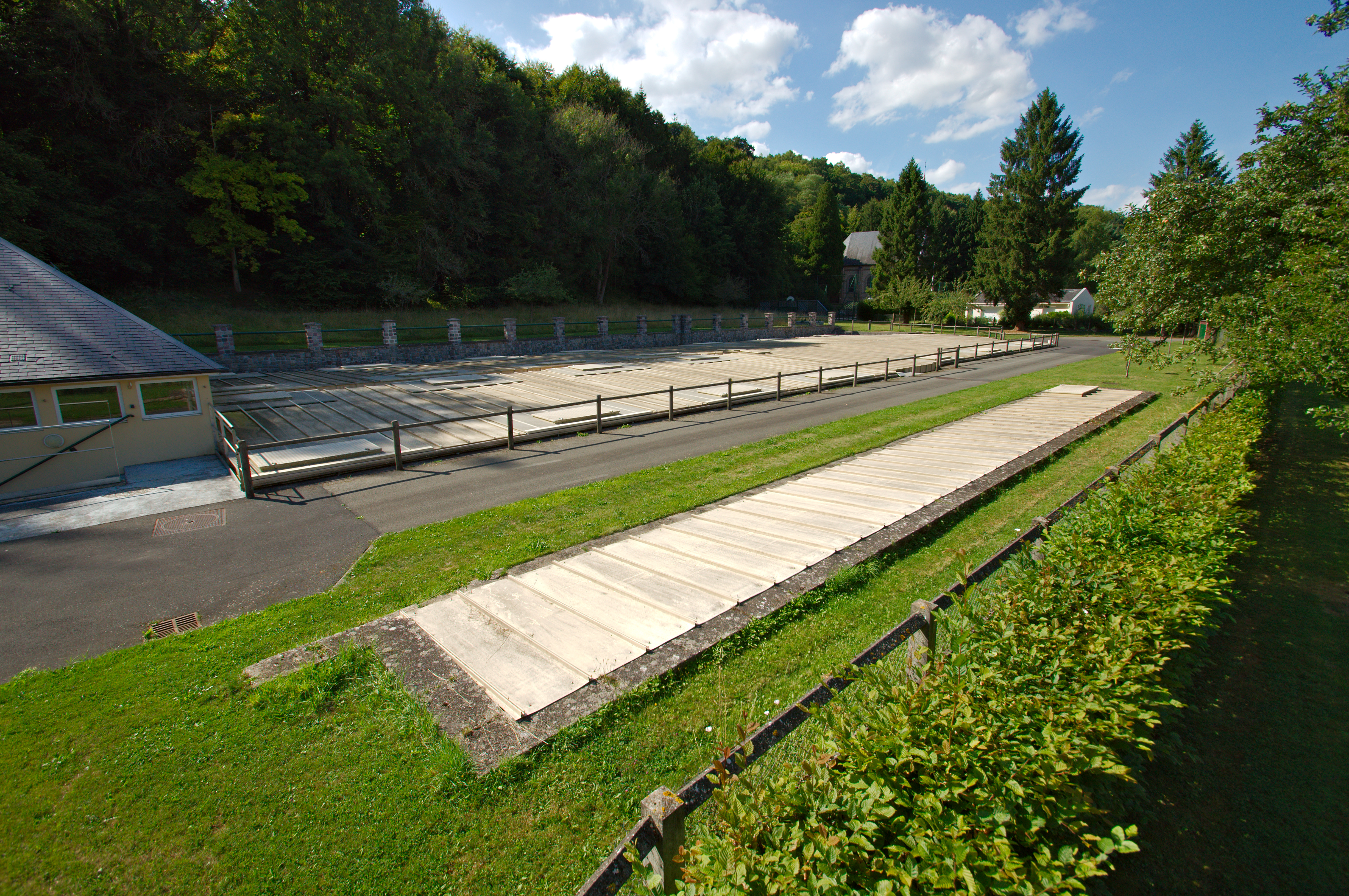 Captation des eaux du Robec à Fontaine-sous-Préaux, route des Sources